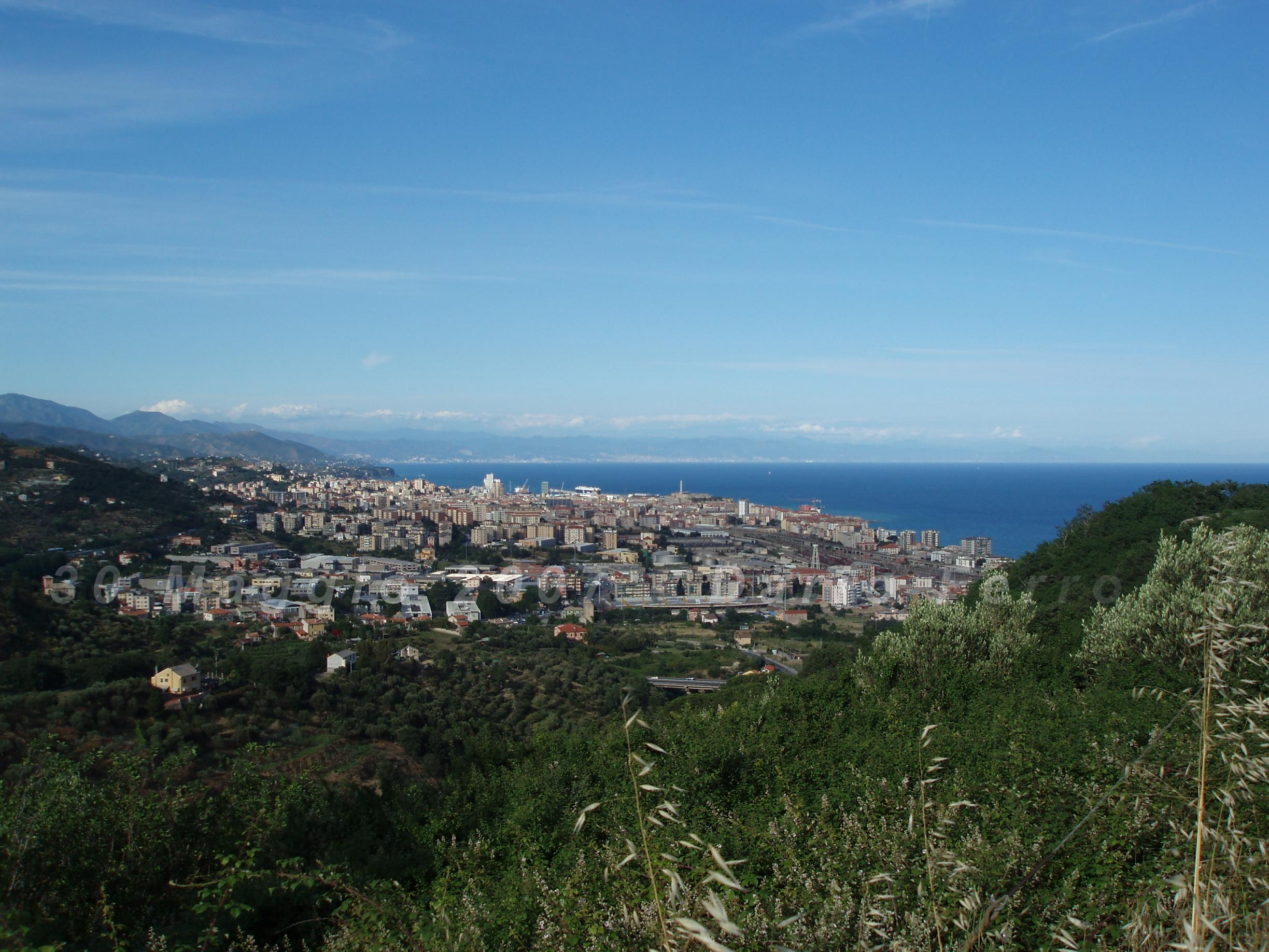 Autore: Dario Ferro. Vista globale di Savona dalla collina di Nostra Signora del Monte. Copyright (c) 2007 Dario Ferro.